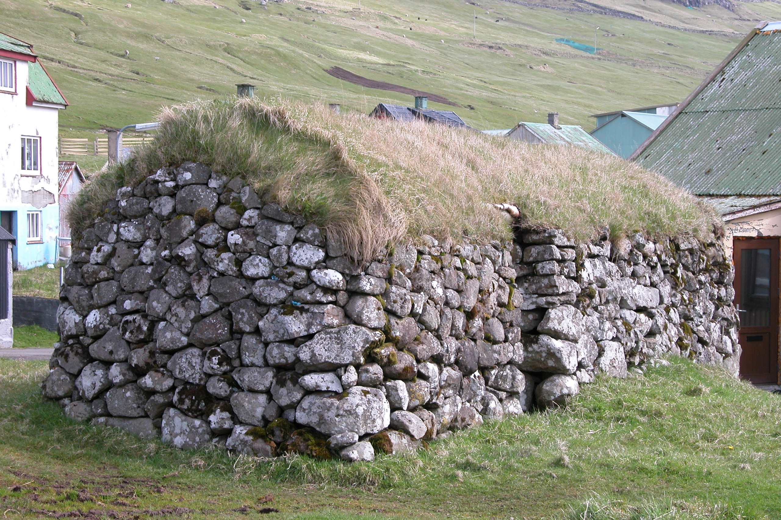 Miðvágur on Vágar, Faroe Islands.